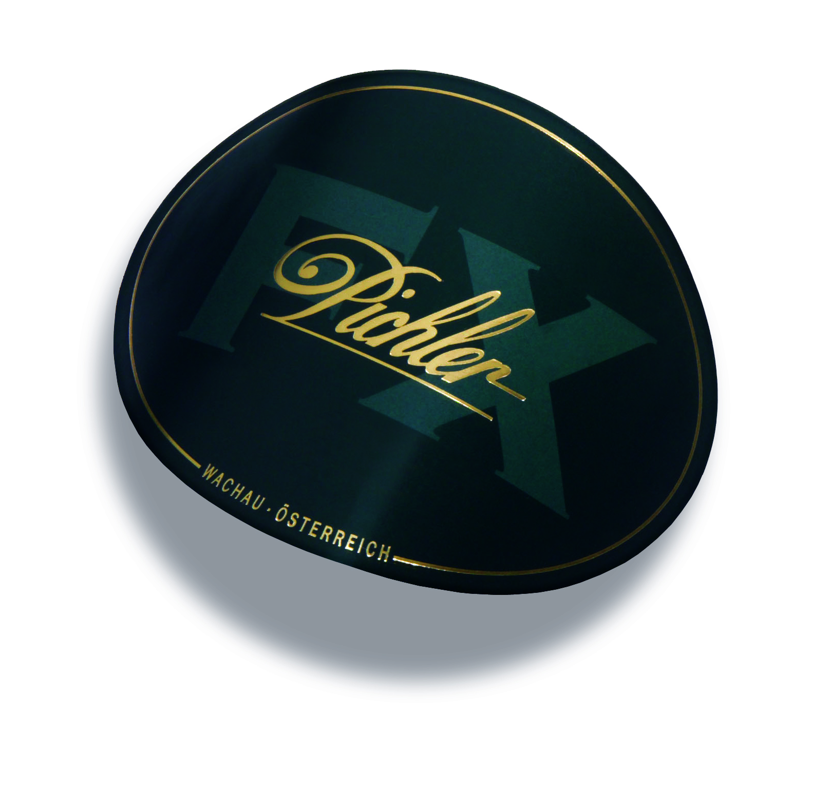 FX Pichler Logo gebogen